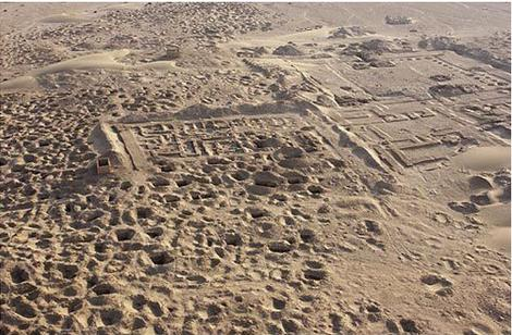 האתר הארכאולוגי של העיר השומרית אומה לאחר מעשי ביזה ושוד שנעשו לאחר פלישת הצבא האמריקאי בשנת 2003